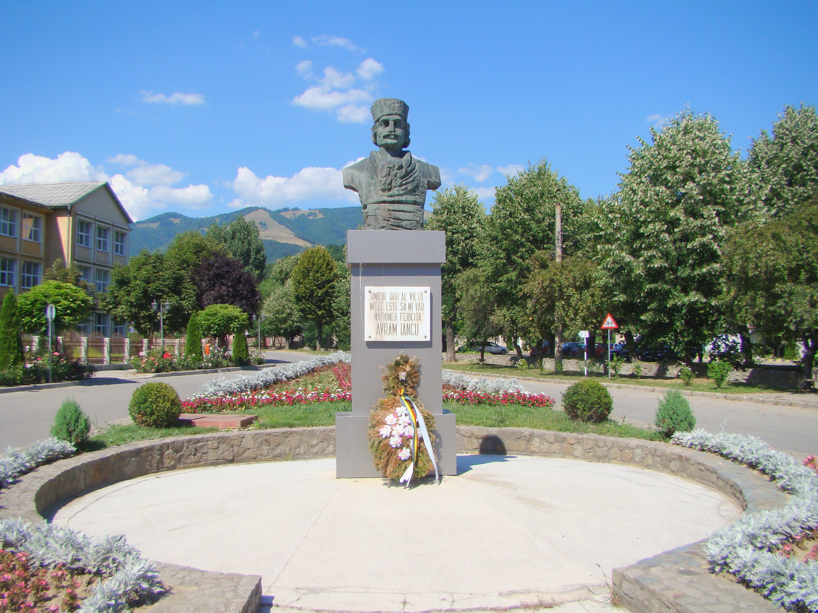 Bustul lui Avram Iancu din Zlatna, judeţul Alba